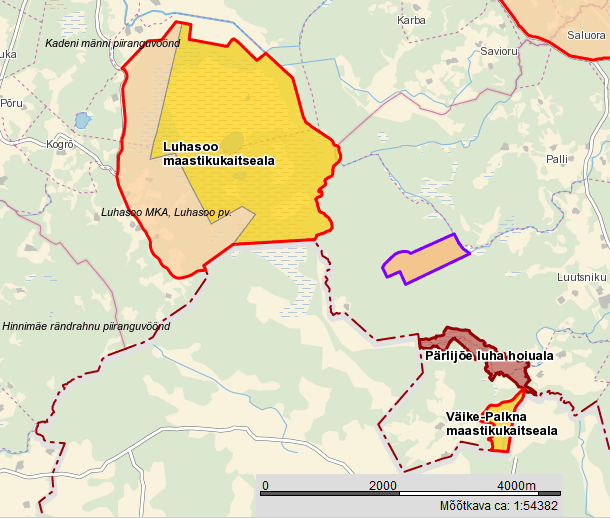 Luhasoo MKA ja Väike-Palkna MKA Maa-ameti kaardil.